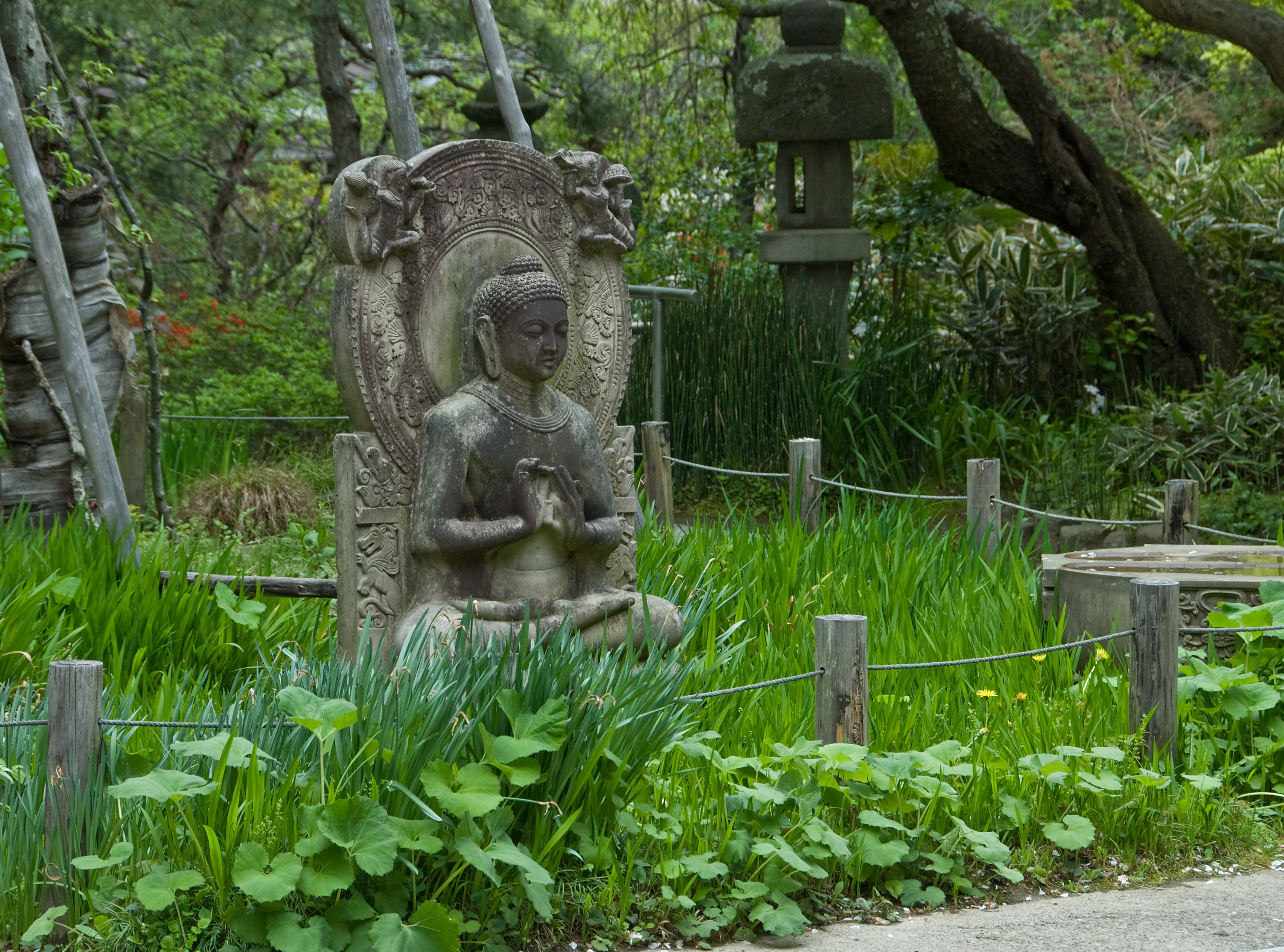 A Buddha at the Ankokuron-ji, Kamakura